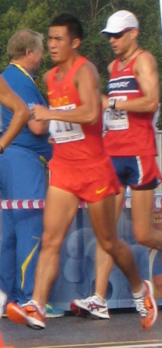 Чемпионат мира по лёгкой атлетике 2013. Ходьба 50 км, мужчины. Пелотон